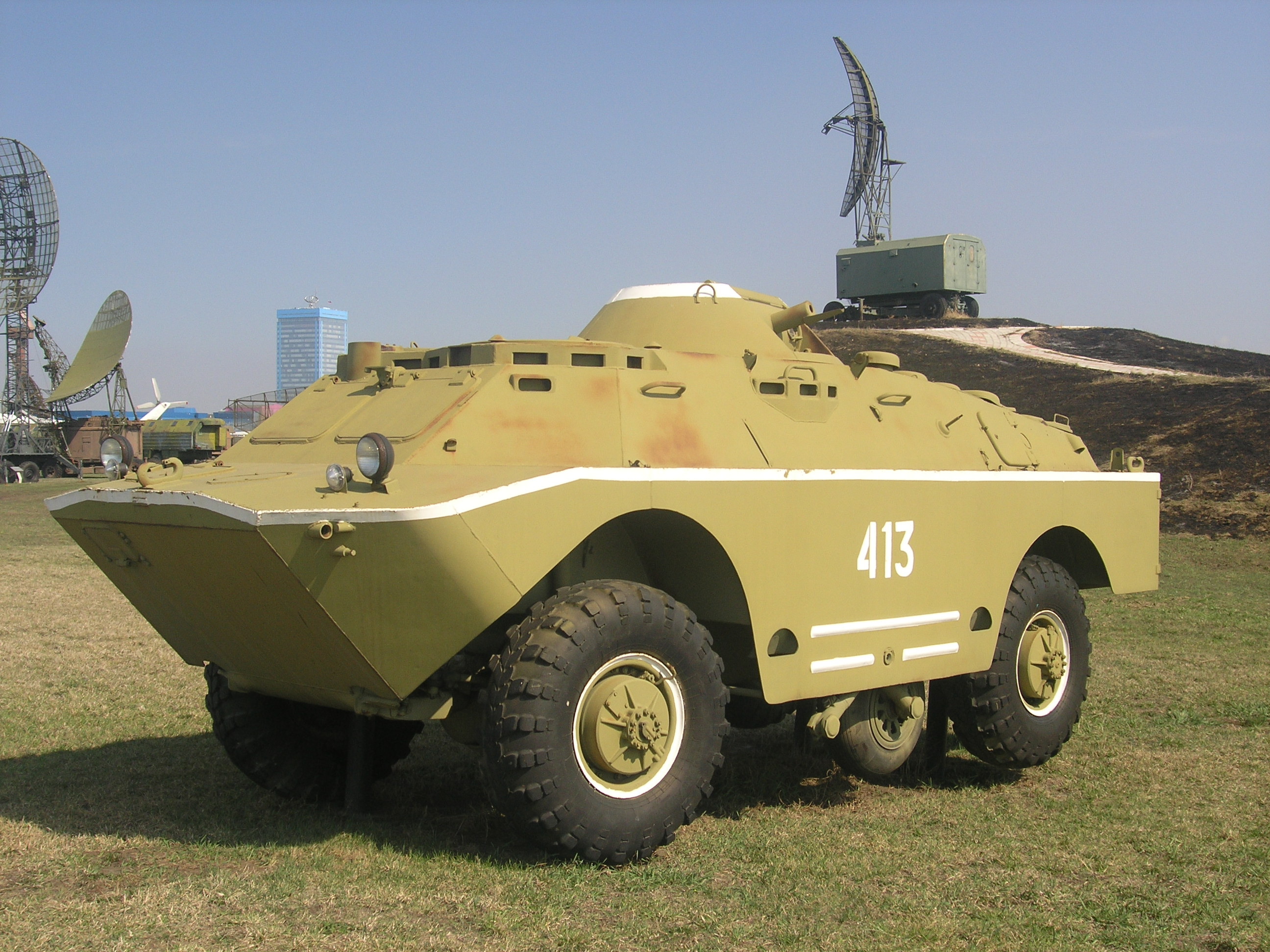 Химическая разведывательная машина БРДМ-2РХ